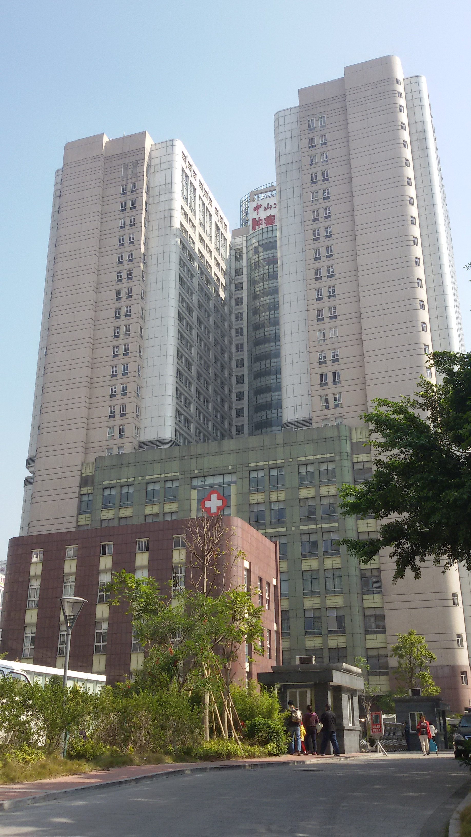 粵語: 中山大學附屬腫瘤醫院